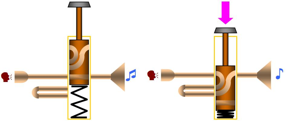 Principe du piston de la trompette et des autres instruments dits à pistons ou à palettes. La colonne d'air est détournée vers un chemin plus long ce qui baisse la hauteur de la note. Schéma réalisé sous word